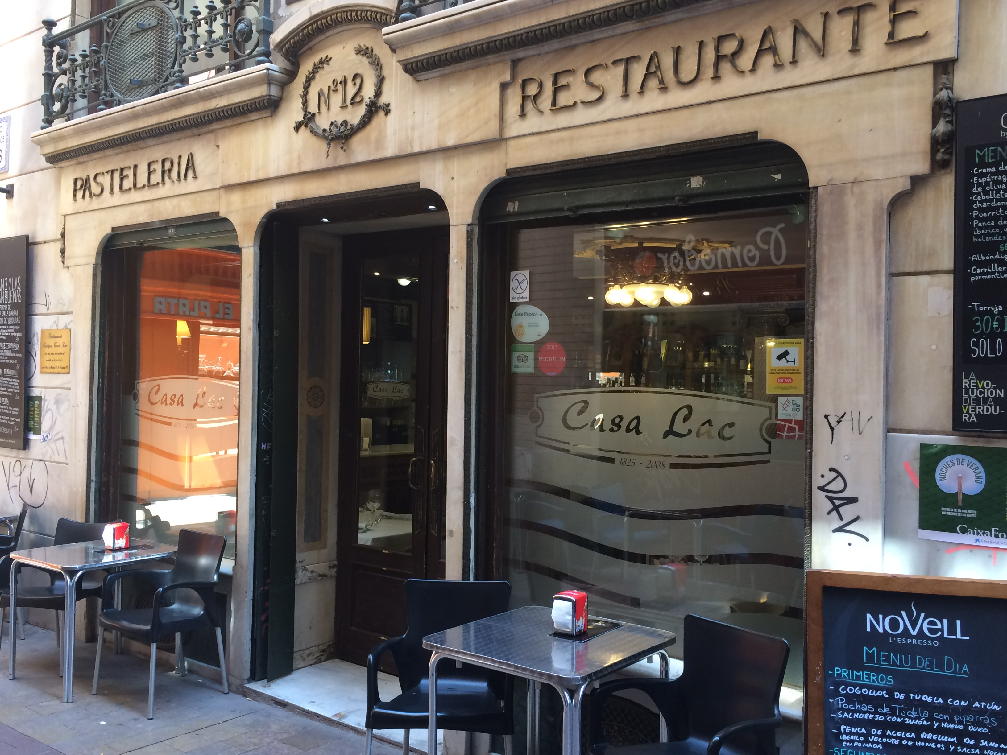 Fachada de Casa Lac, restaurante fundado en 1825 en Zaragoza.